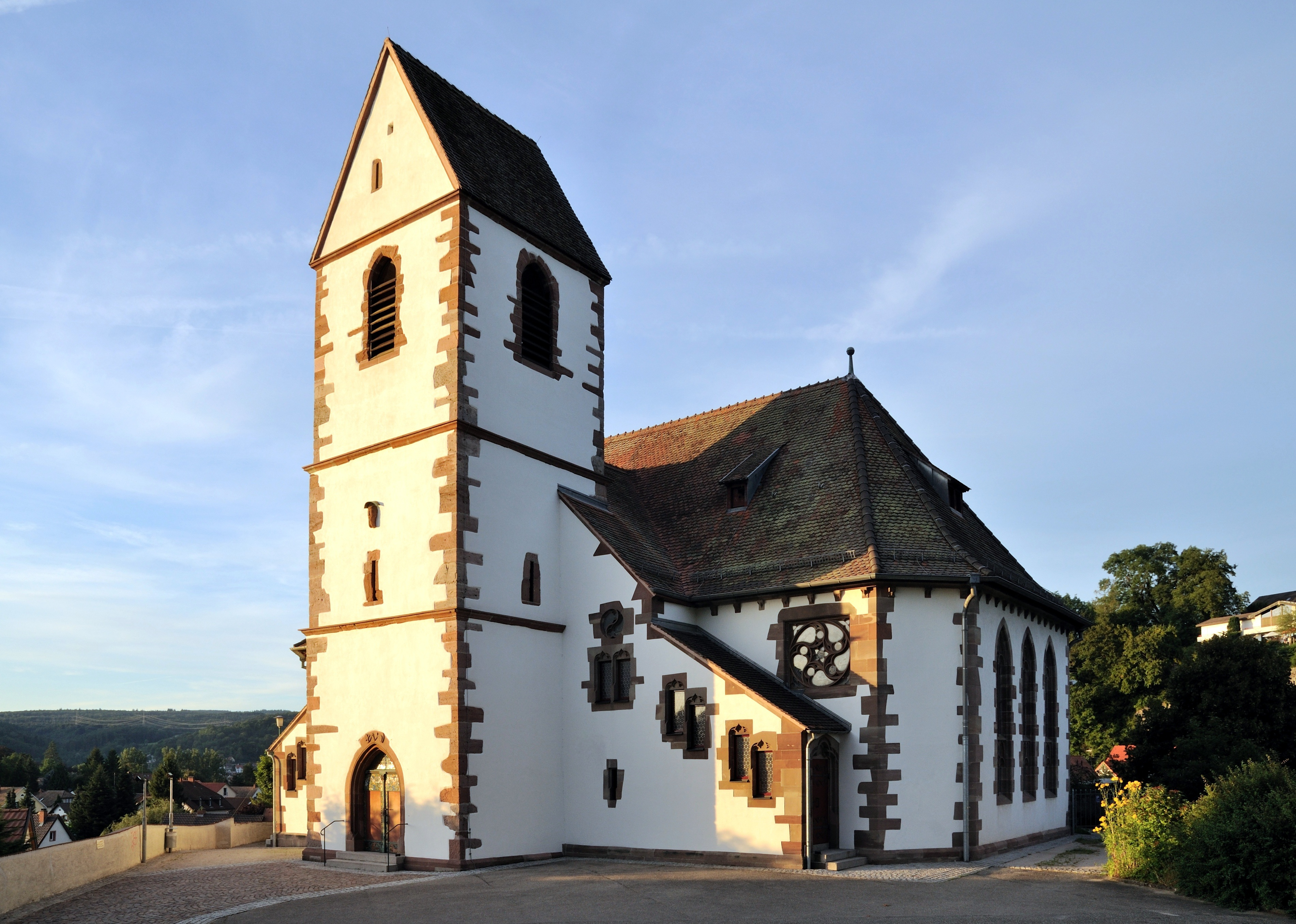 Brombach: Germanus-Kirche (die zum Zeitpunkt der Aufnahme existierenden Graffiti wurden digital entfernt)